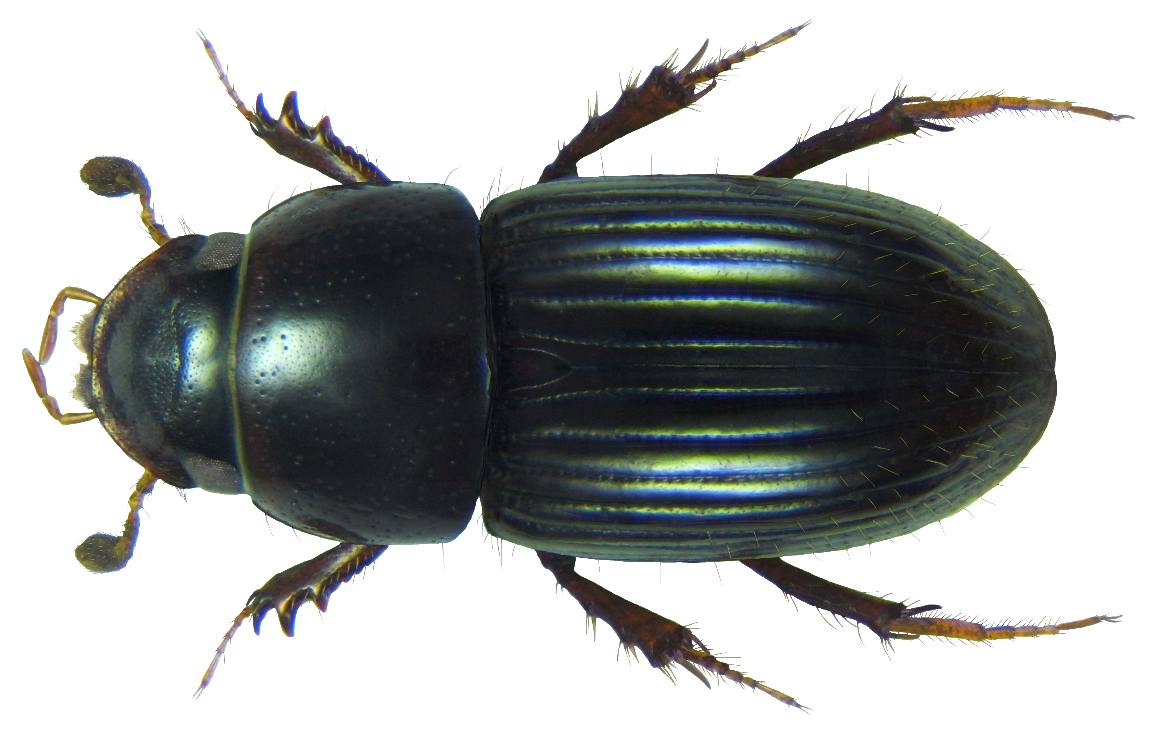 Aphodius (Aganocrossus) urostigma Harold, 1862 Familie: Scarabaeidae Groesse: 5,2 mm Fundort: Indien, Südgoa, District Canacona, Canacona, Raj Baga Beach leg. U.Schmidt, 16.-29.XI.2010; det. Bellmann, 2011 Photo: U.Schmidt, 2012